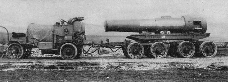 vettura obice 420/12